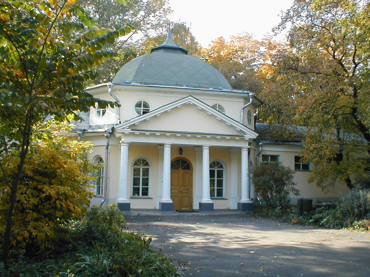 Xviii